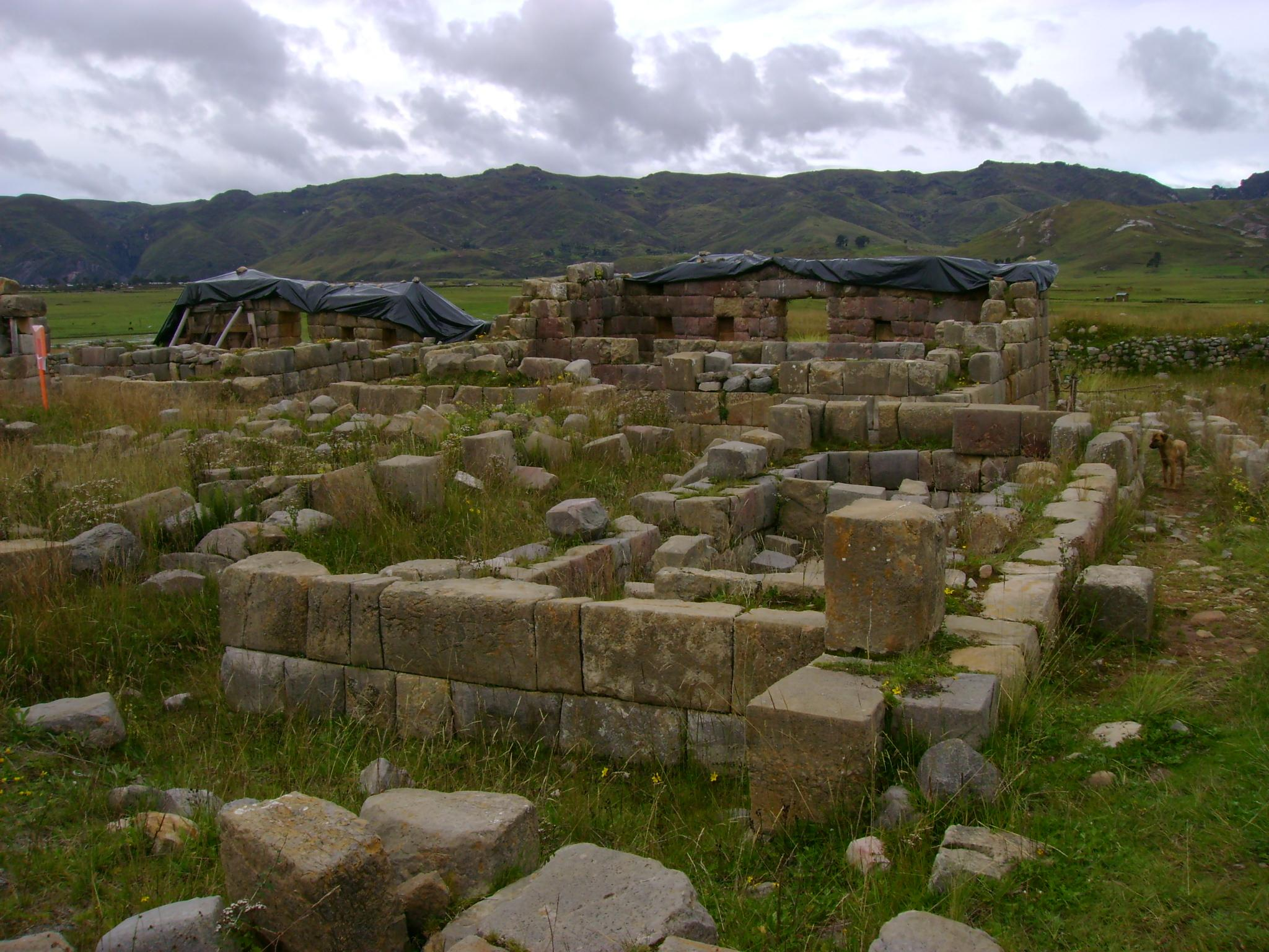 Ruinas Incaicas de Huánuco Marca.